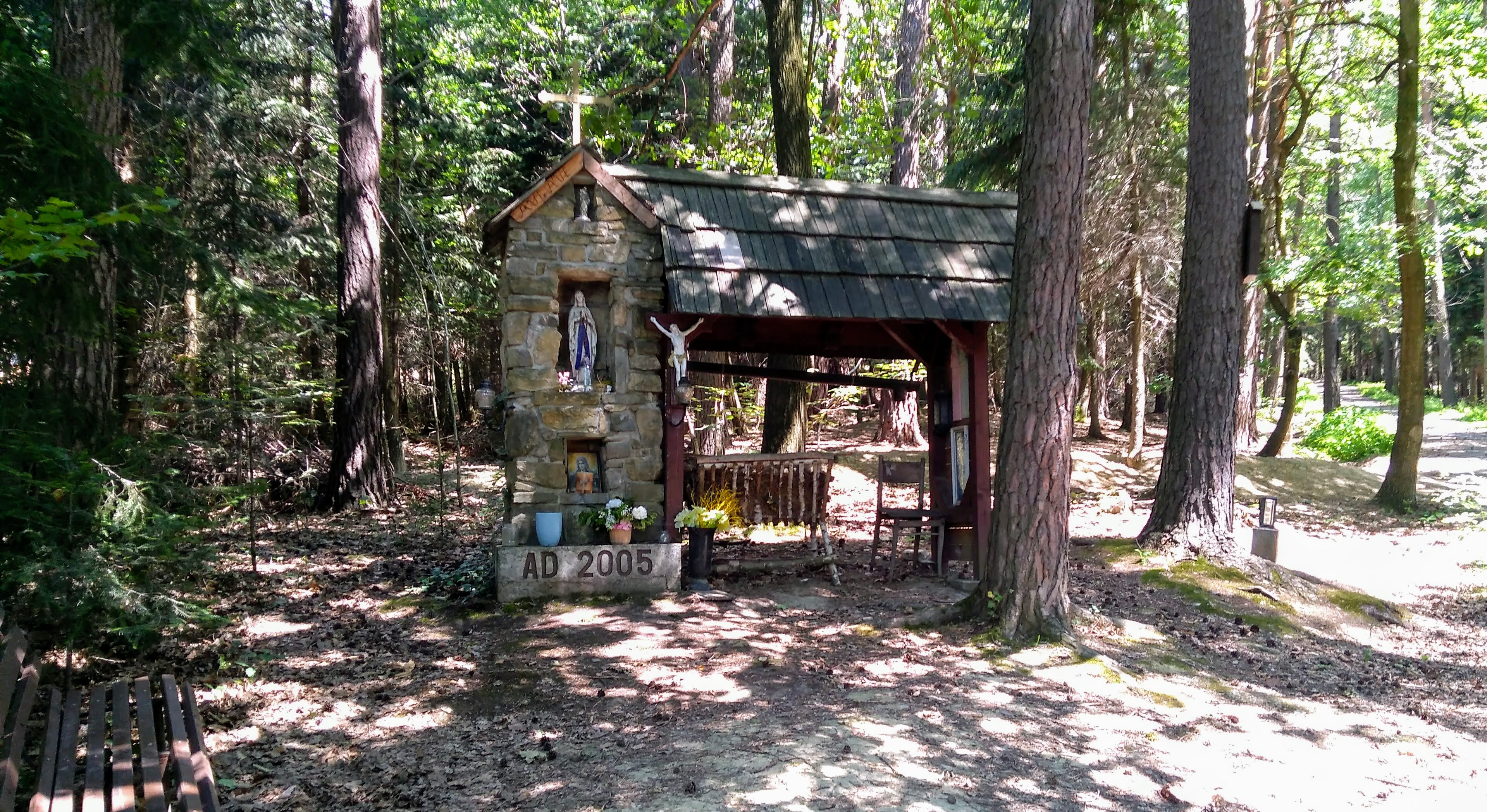 Křížová cesta z roku 2005 u Velikové, poslední zastavení